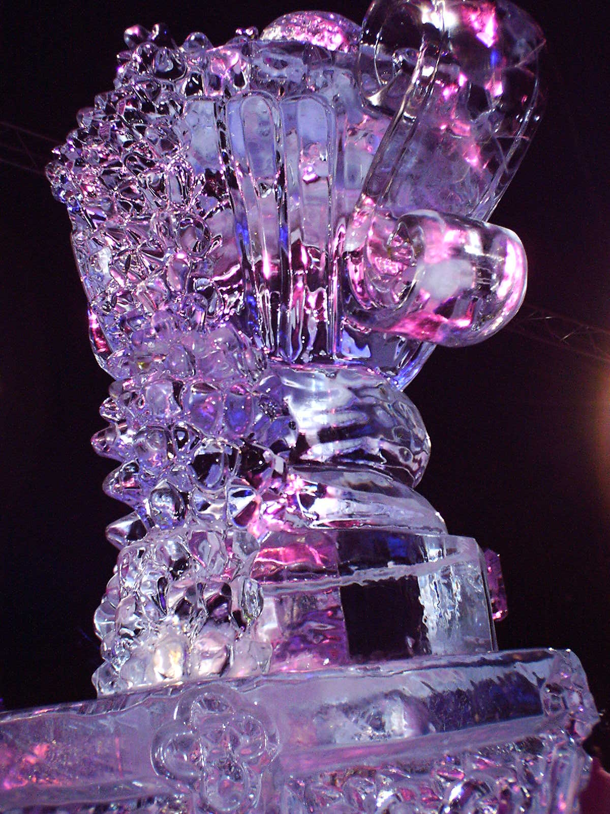 Eine Skulptur der Ice World 2003